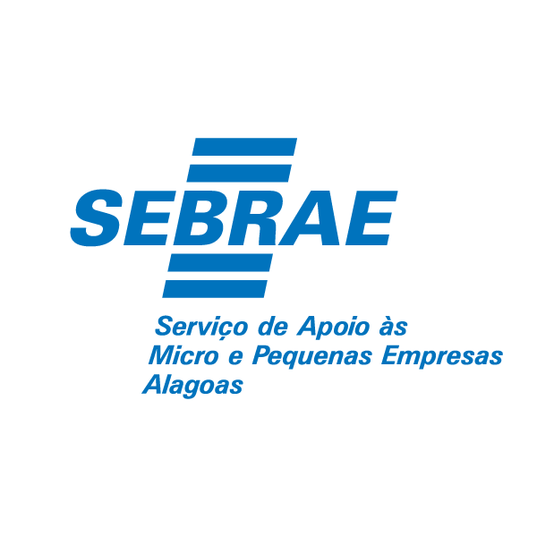 Sebrae AL